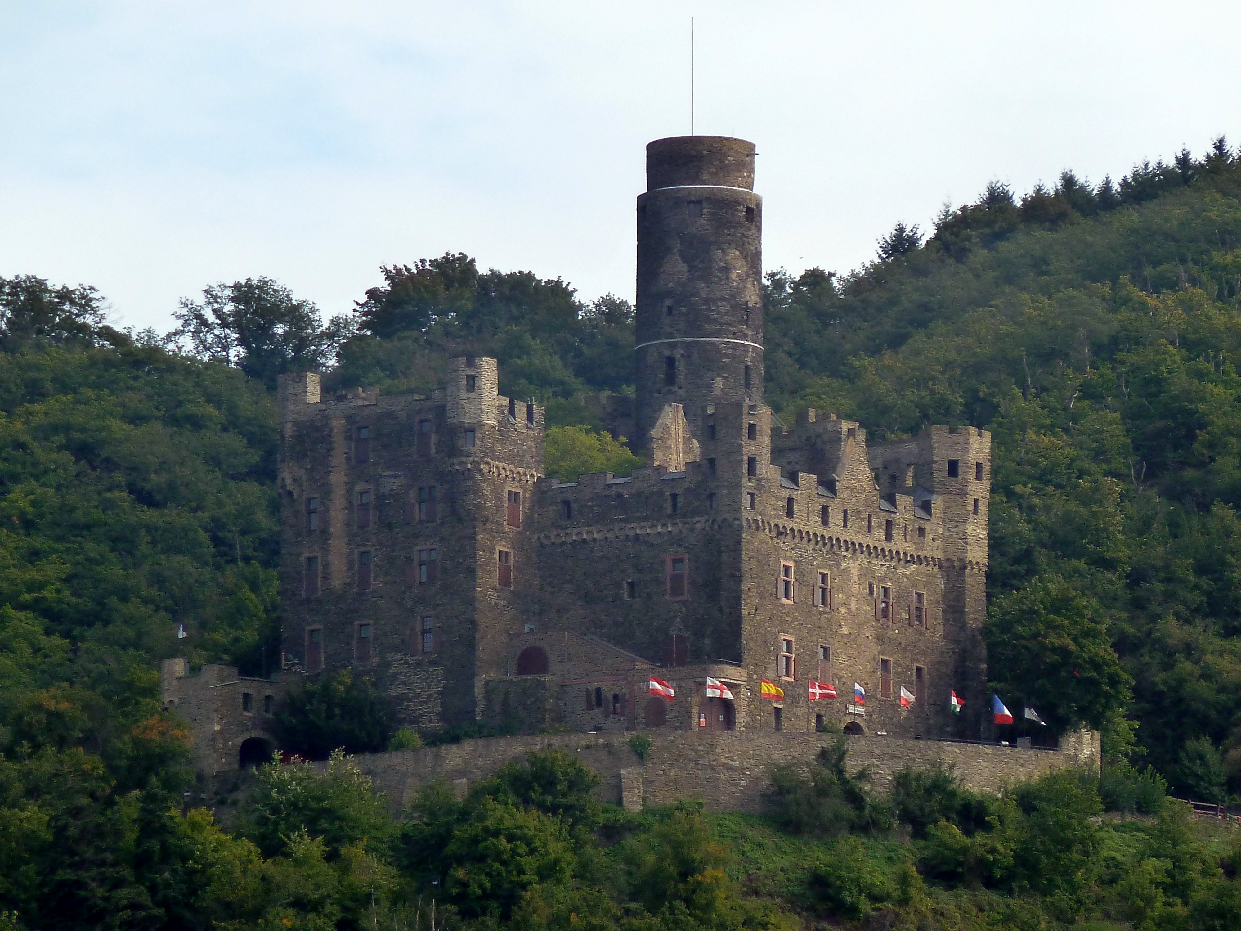 Burg Maus bei Wellmich